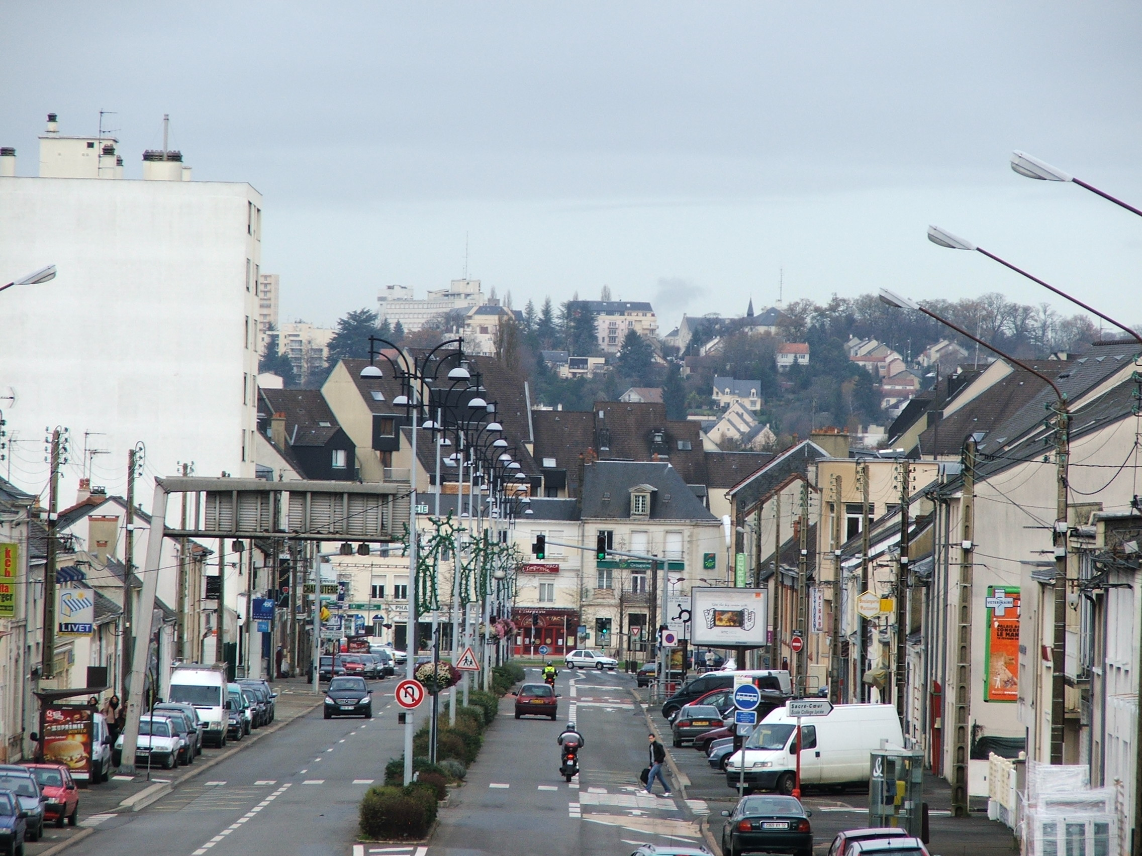 Avenue Felix Geneslay au Mans, au sud du quartier de Pontlieue.